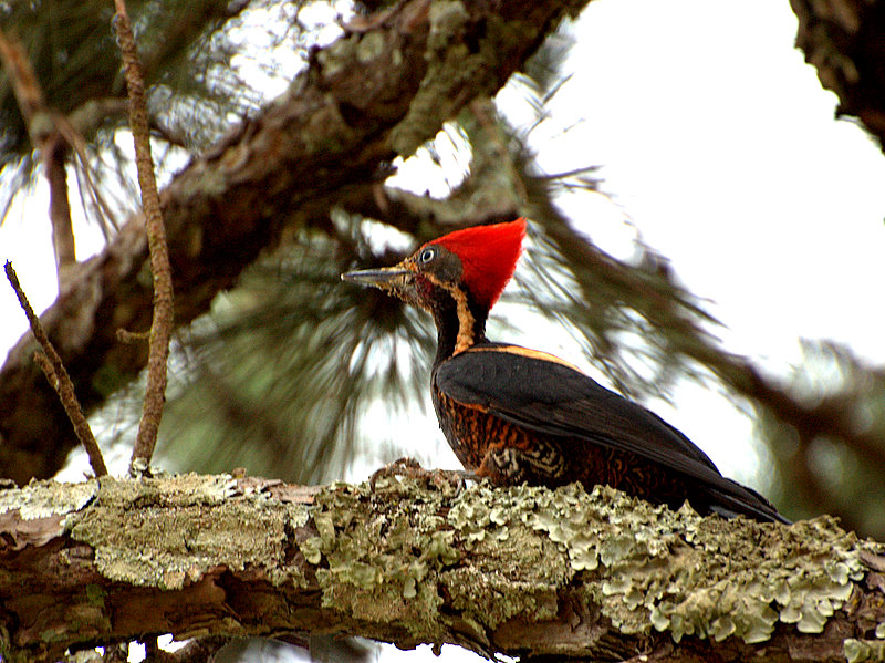 Dryocopus lineatus Fazenda do Estado" localizada no município de Manduri-SP